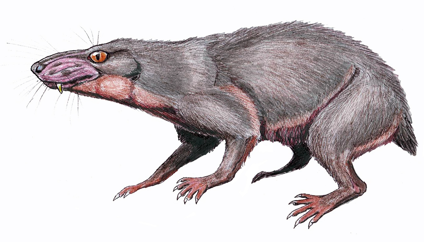 Regisaurus jacobi